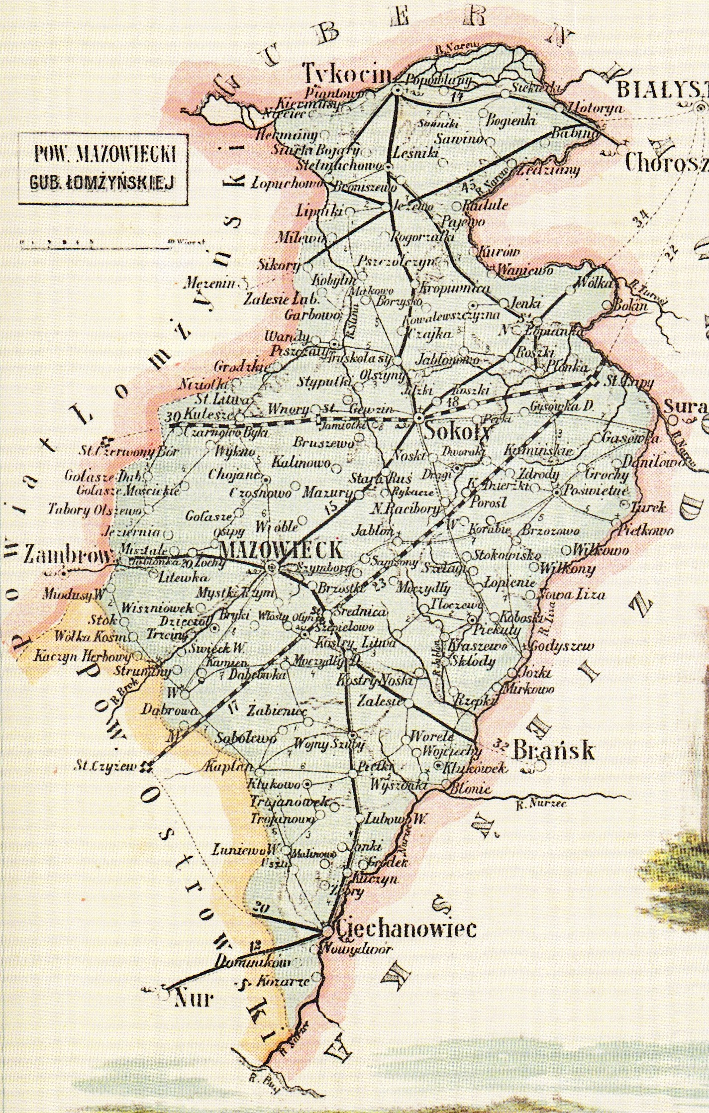 Na mapie powiat mazowiecki, gubernia łomżyńska dodatkowo znajduje się pomnik Stefana Czarnieckiego w Tykocinie oraz Grodzisko pod wsiami Grodzkie a sam atlas zawiera również opis Królestwa Polskiego.